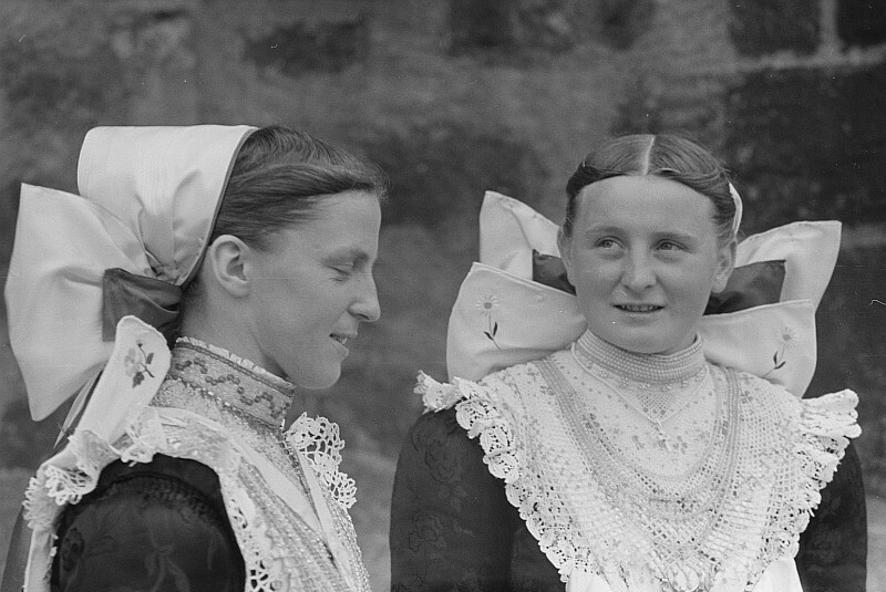 Original image description from the Deutsche Fotothek Sorbinnen